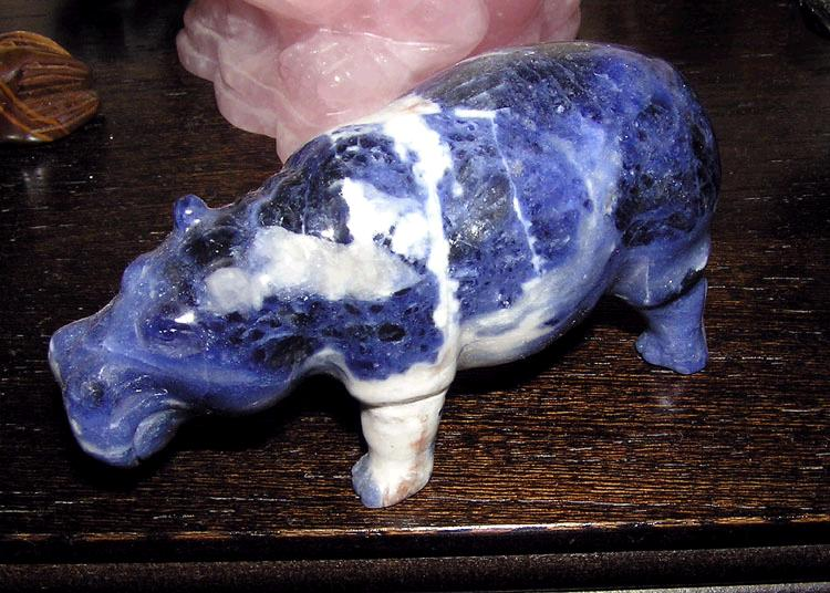 Sodalite hippo